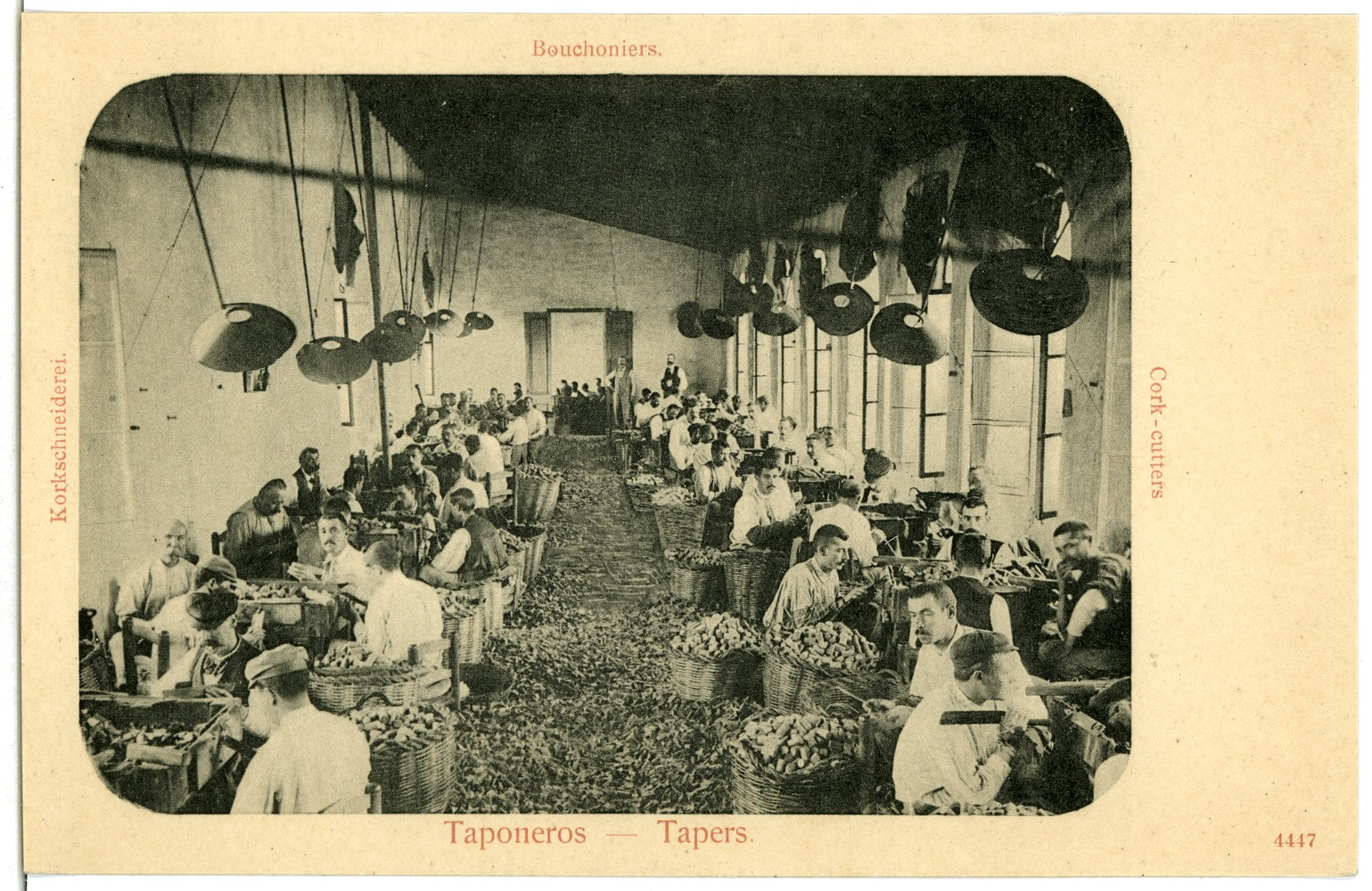 Korkschneiderei This postcard is from publisher Brück & Sohn in Meißen ( postcard has a unique number 04447 and is available in a higher resolution at the publisher. This images was uploaded in a cooperation project between Wikipedians and the publisher.